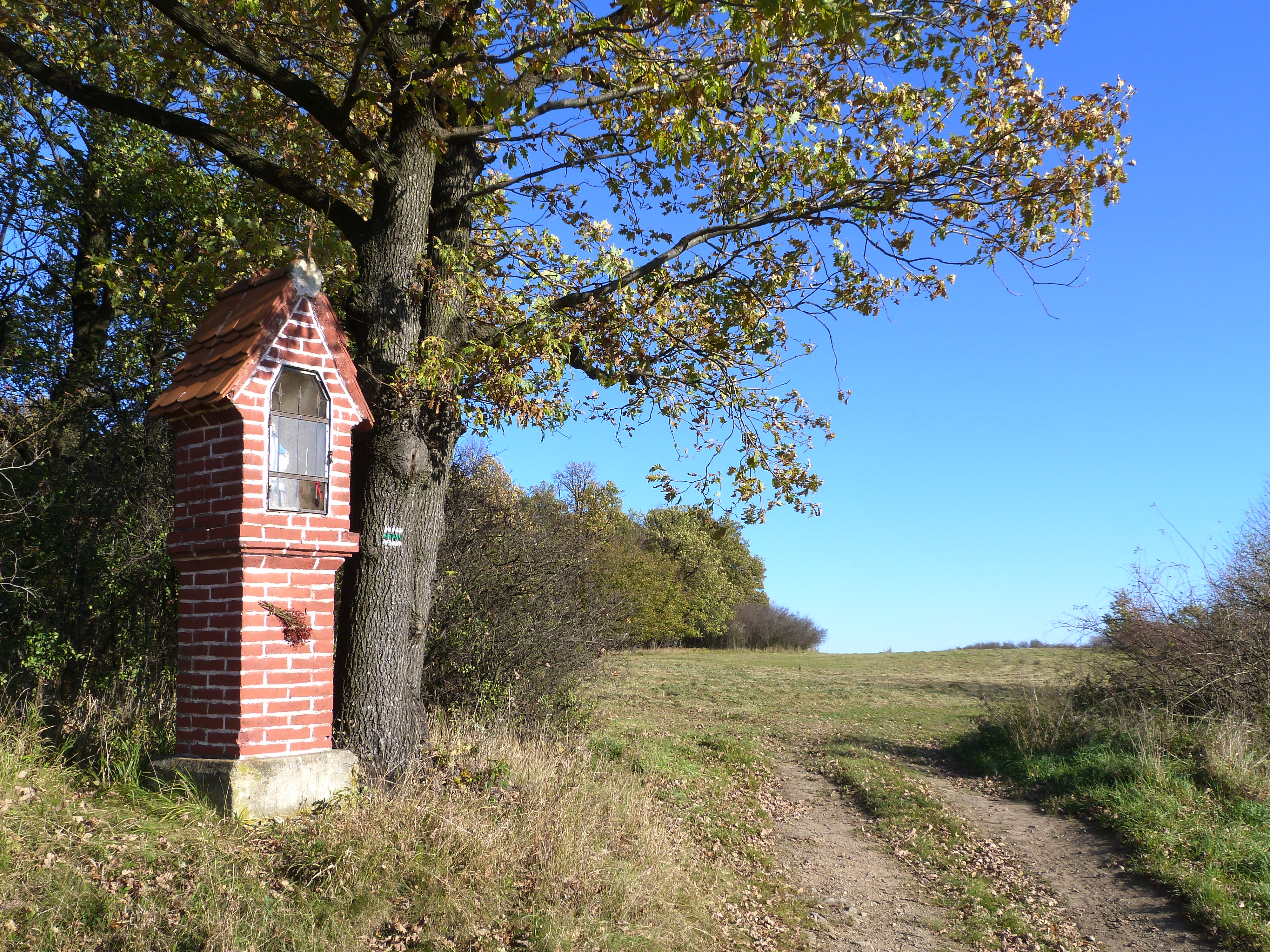 Boží muka v katastru Pitárné, obec Vysoká (Bruntál)